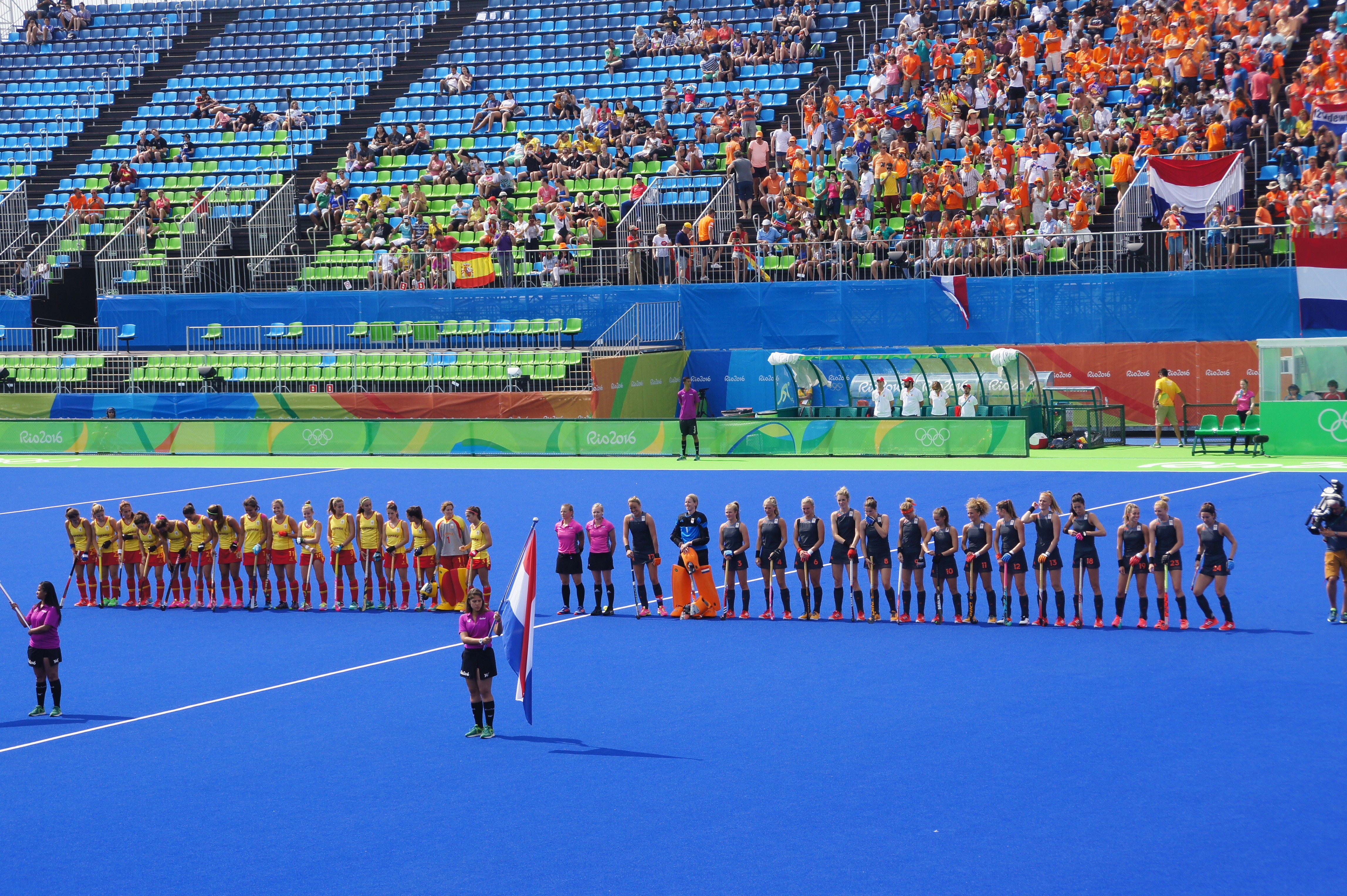 Rio 2016.Hóquei na grama. Feminino. Holanda x Espanha. 19